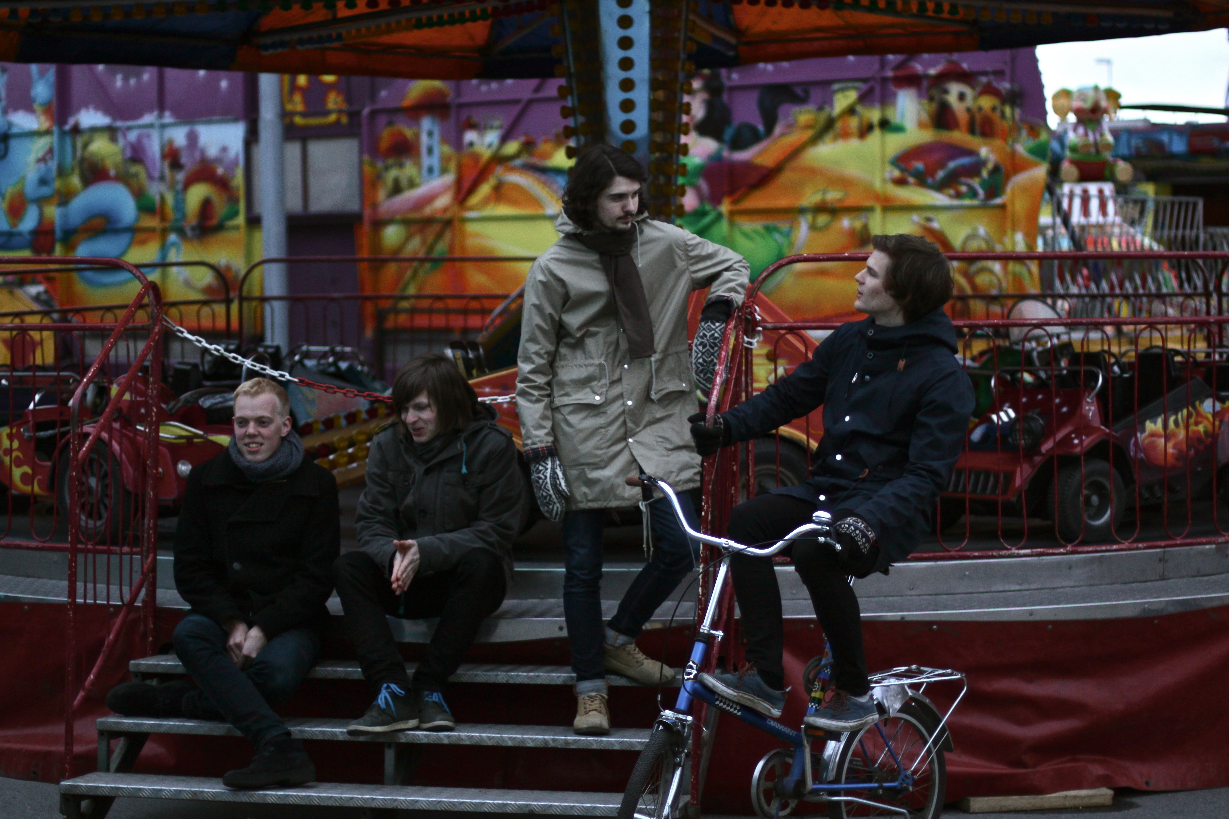 Kråkesølv spiller musikk som best kan beskrives som en blanding av skranglerock, post rock og lo-fi pop.